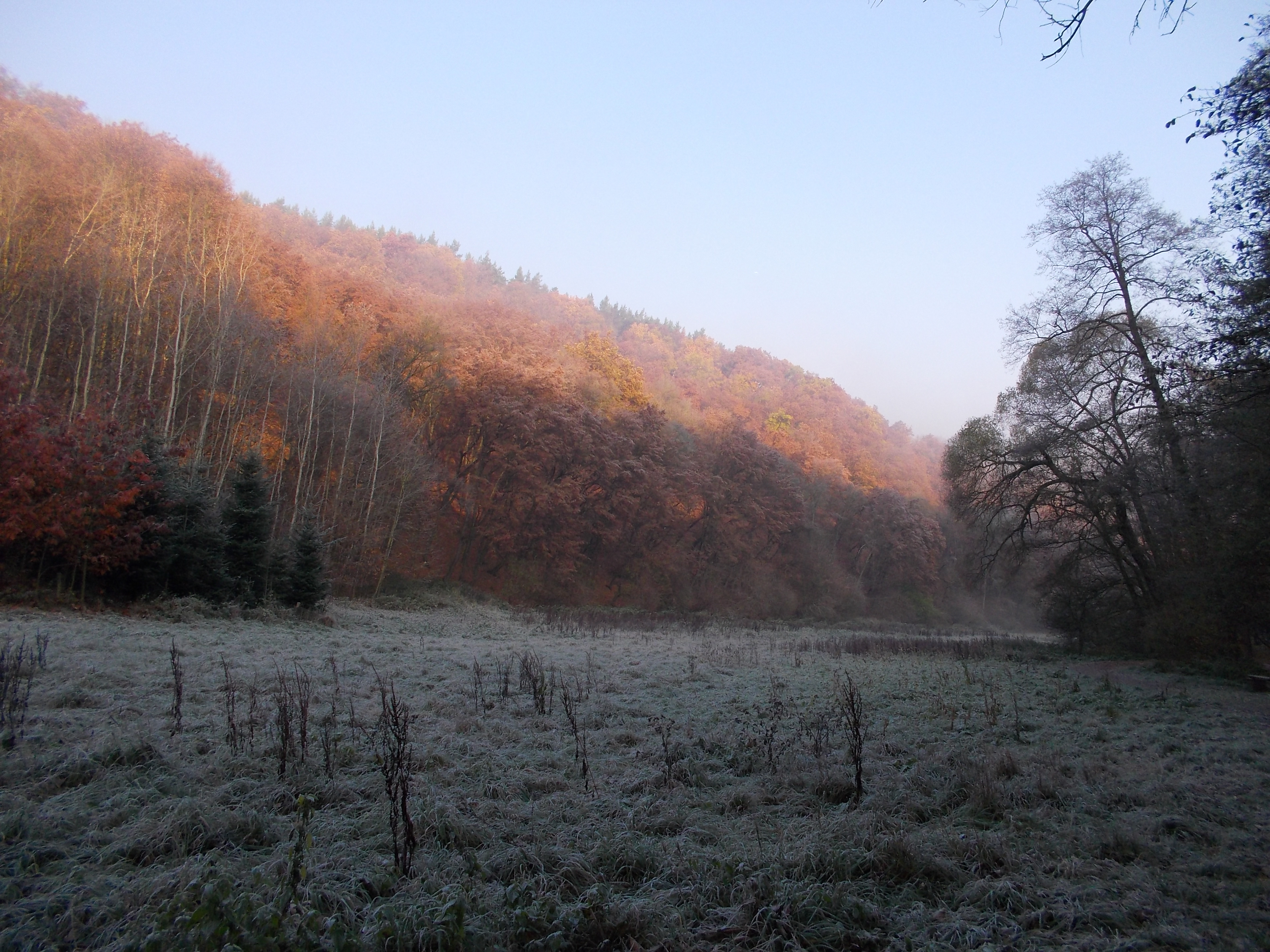 Součást usedlosti